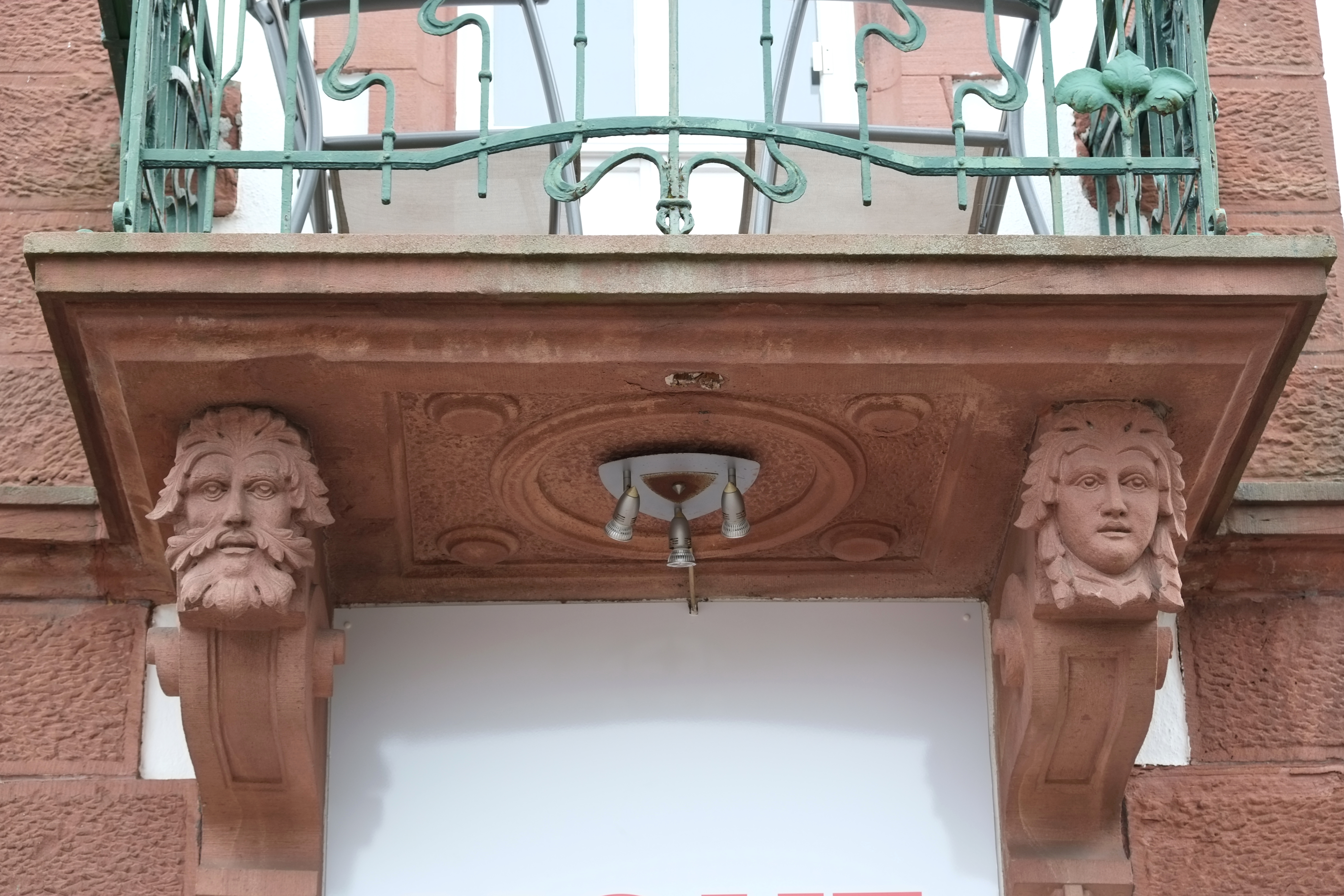 Bahnhof-Hotel (Eisenbahnstraße 1-2) in Buchen (Odenwald) im Neckar-Odenwald-Kreis (Baden-Württemberg, Deutschland)